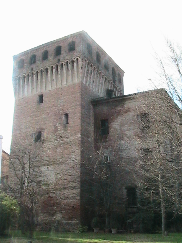 Casalmaggiore - Torrione Estense